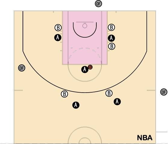 NBAフリースロー配置 NBA Free throw Posinoning / Adobe Illustrator 9.0J